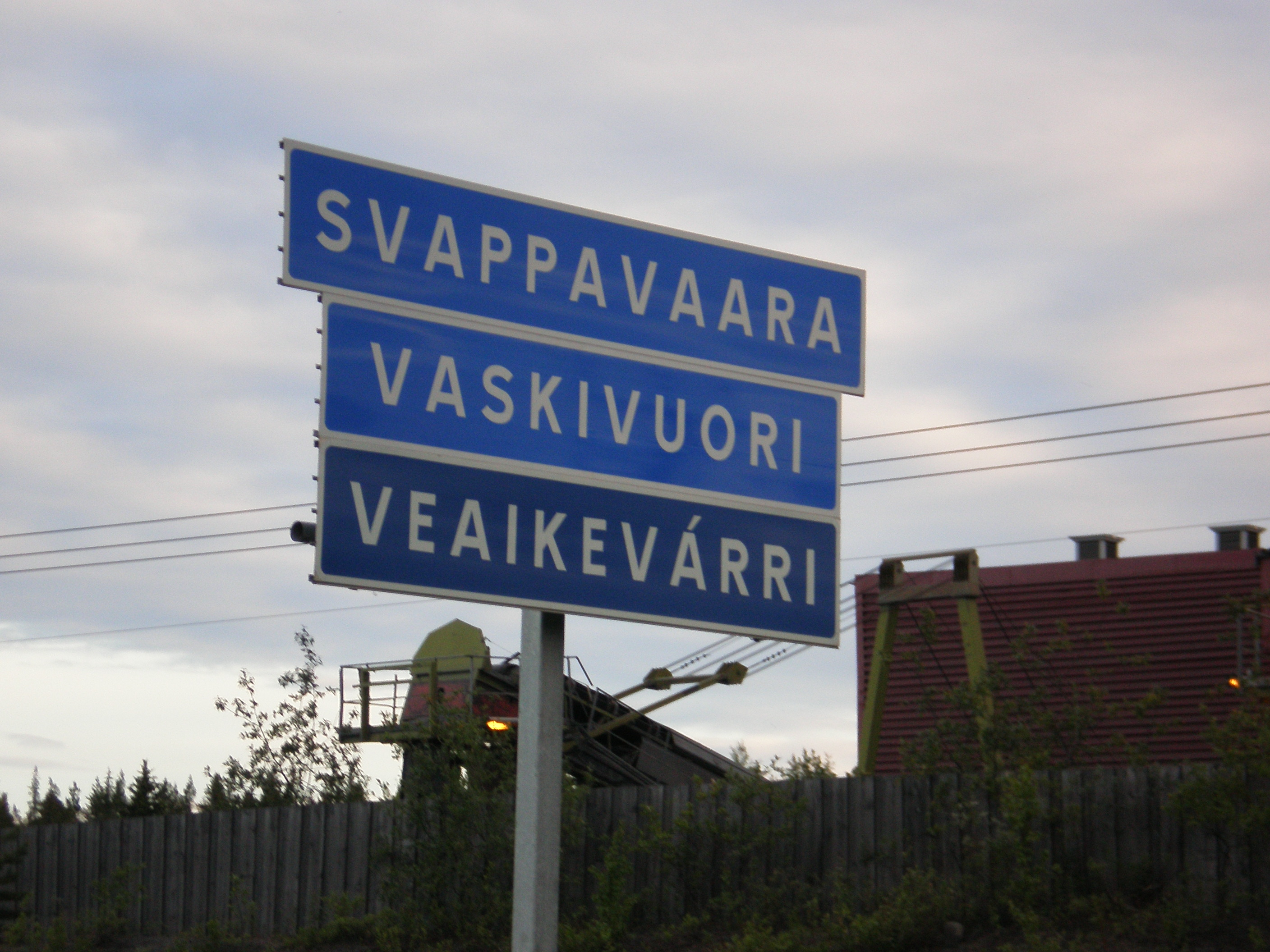 Svappavaara på tre språk.